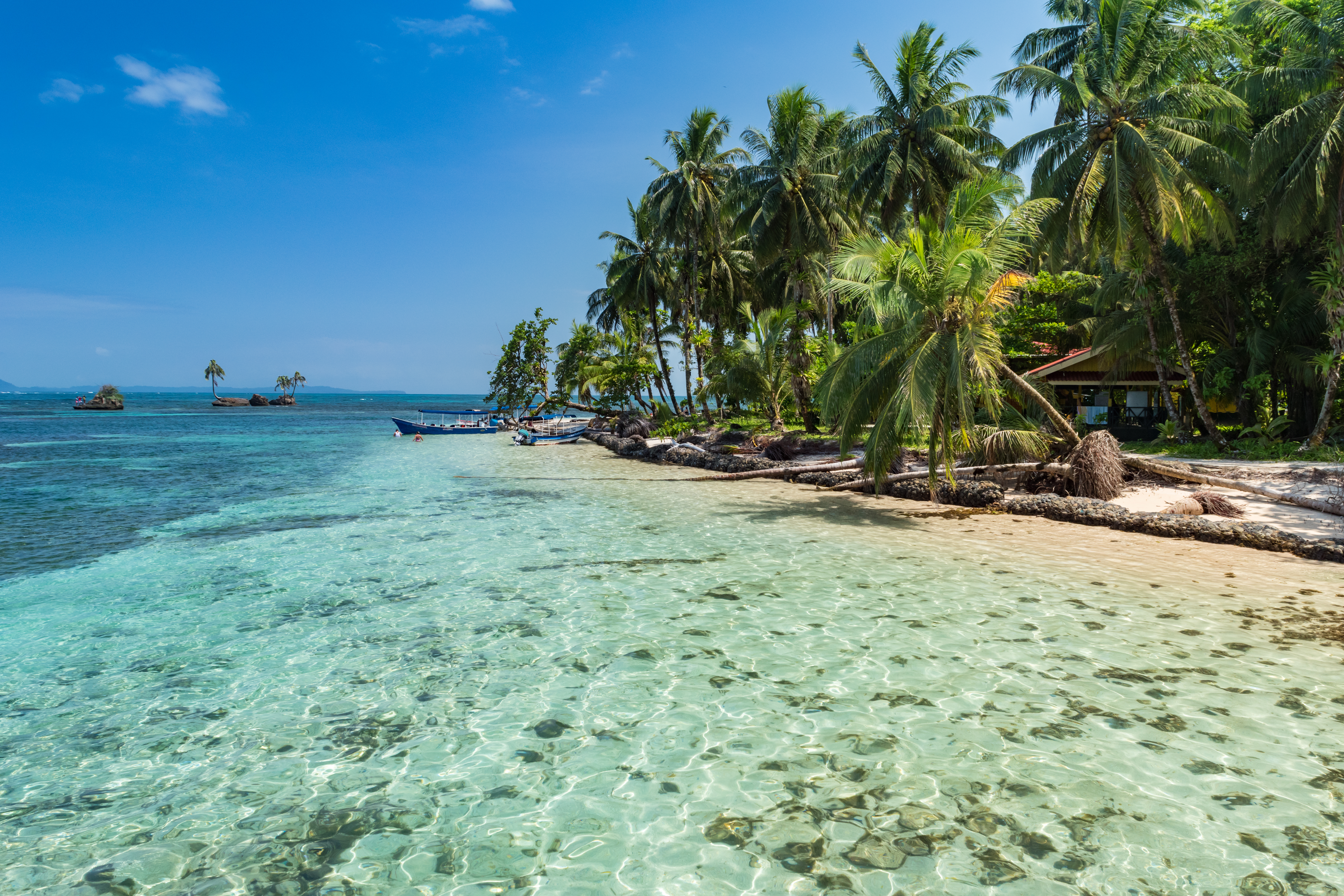 Panama